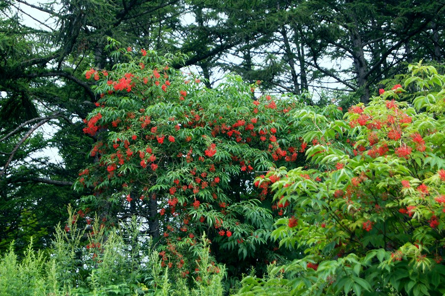 Sambucus racemosa